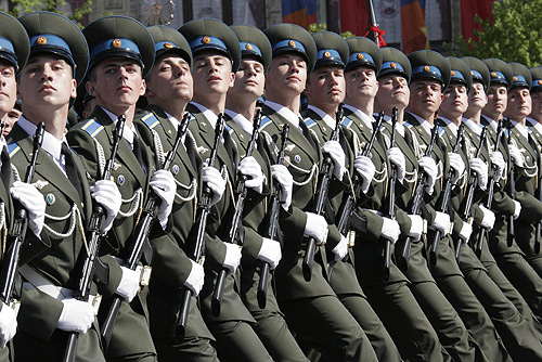 Москва. Военный парад в честь 64-й годовщины Победы в Великой Отечественной войне.